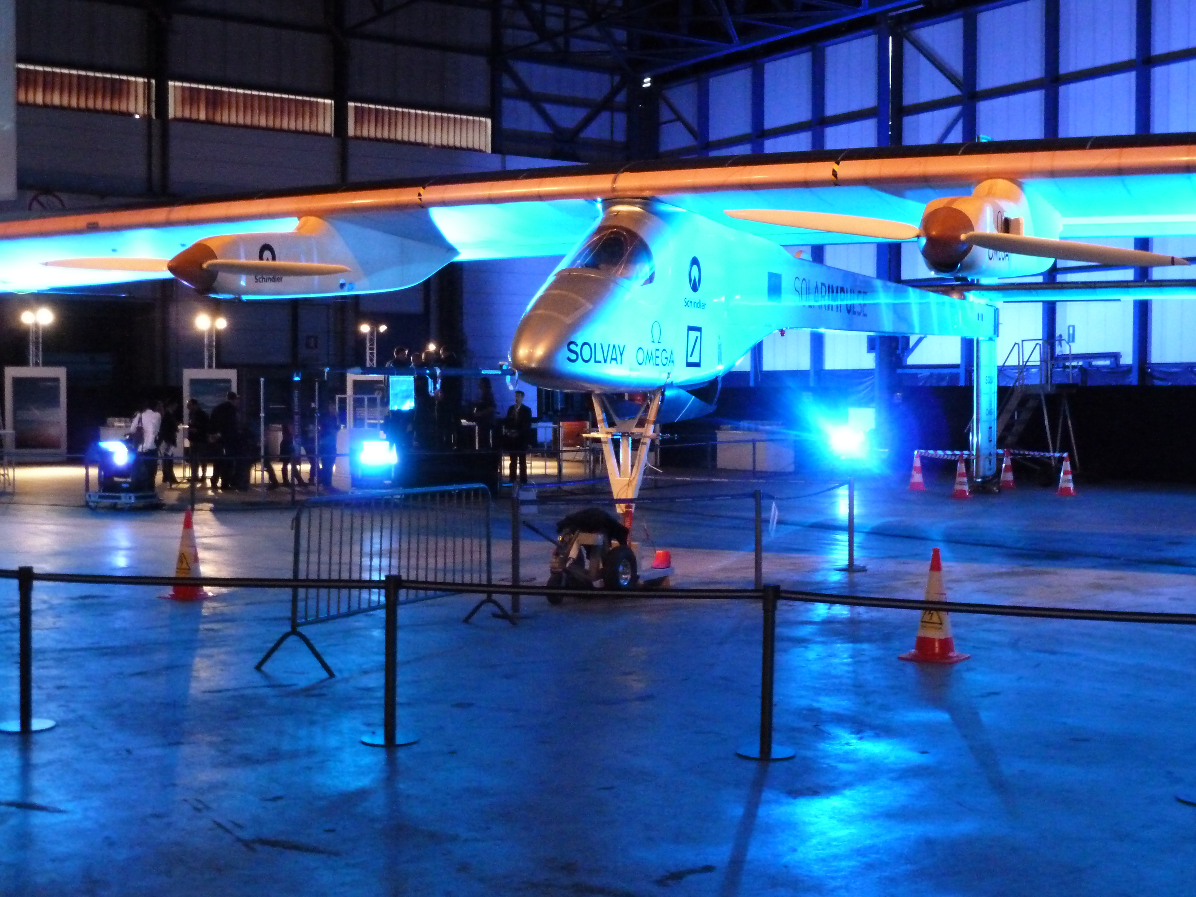 Solar Impulse (HB-SIA) à l'aéroport de Bruxelles-National (Zaventem), Belgique, le 25 mai 2011.